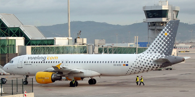 vueling barcelona